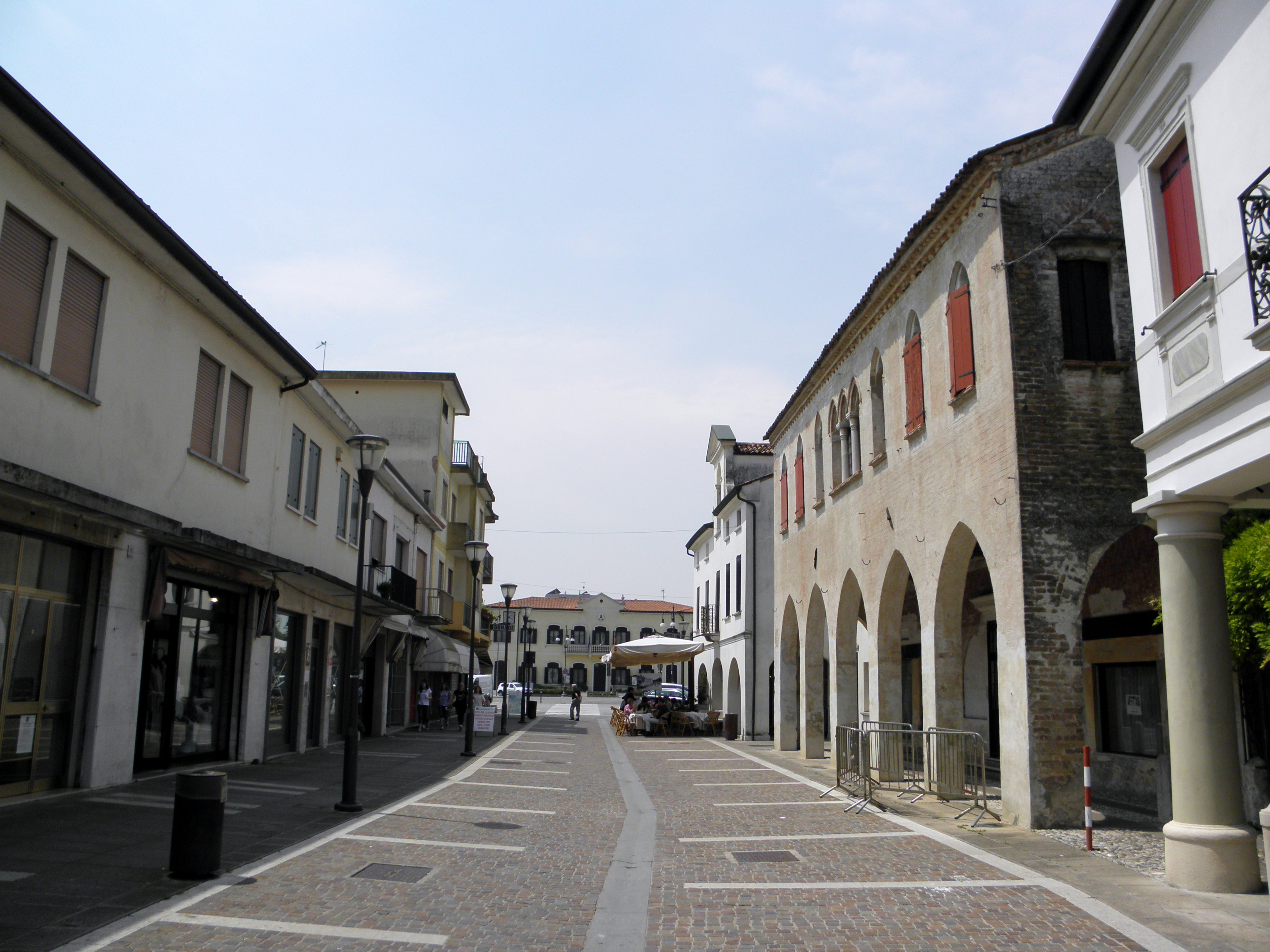 Zero Branco, Via Martiri della Libertà, direzione Piazza Umberto I. Sullo sfondo si nota la palazzina municipale.